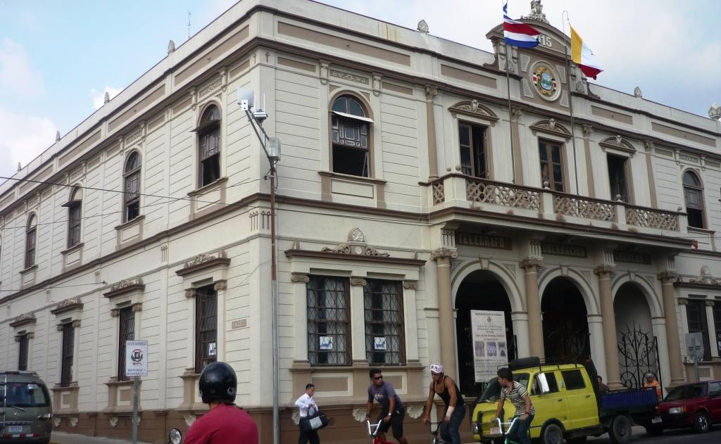 Das 2009 restaurierte Hauptpostamt in Heredia (Edificio Central de Correos de Costa Rica en Heredia, restaurado en el 2009)